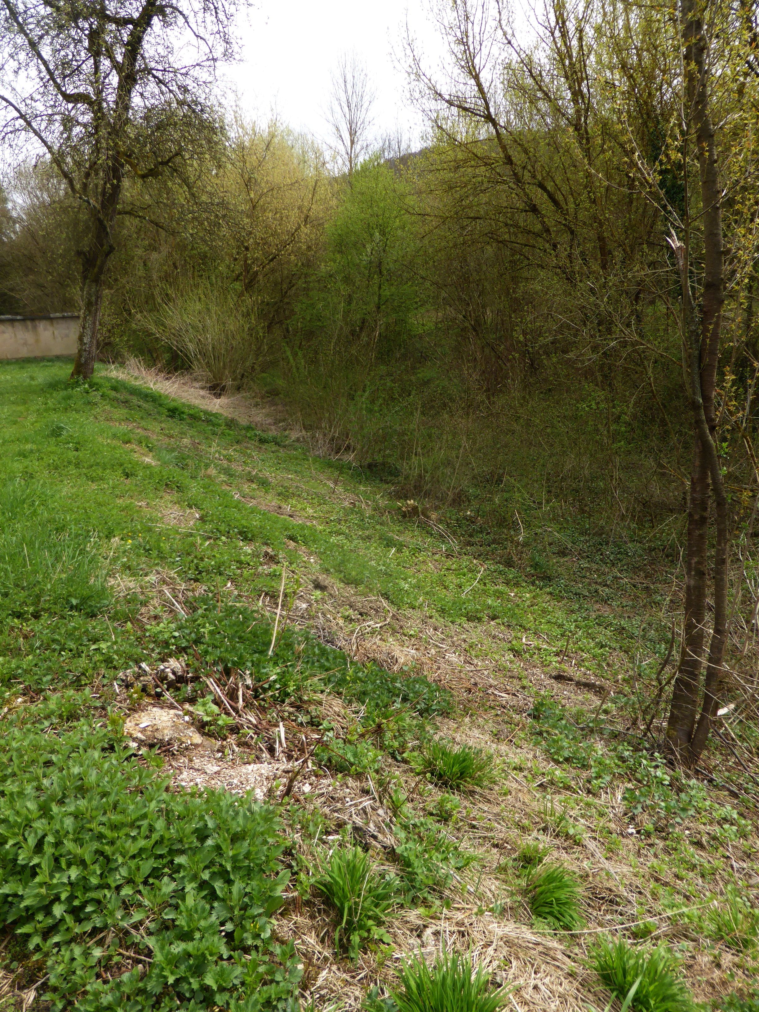 Hammerweg (Riedenburg)